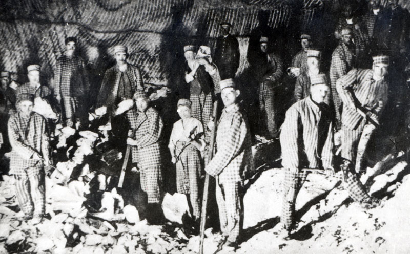 Deținuți folosiți la tăierea sării (Târgu Ocna).